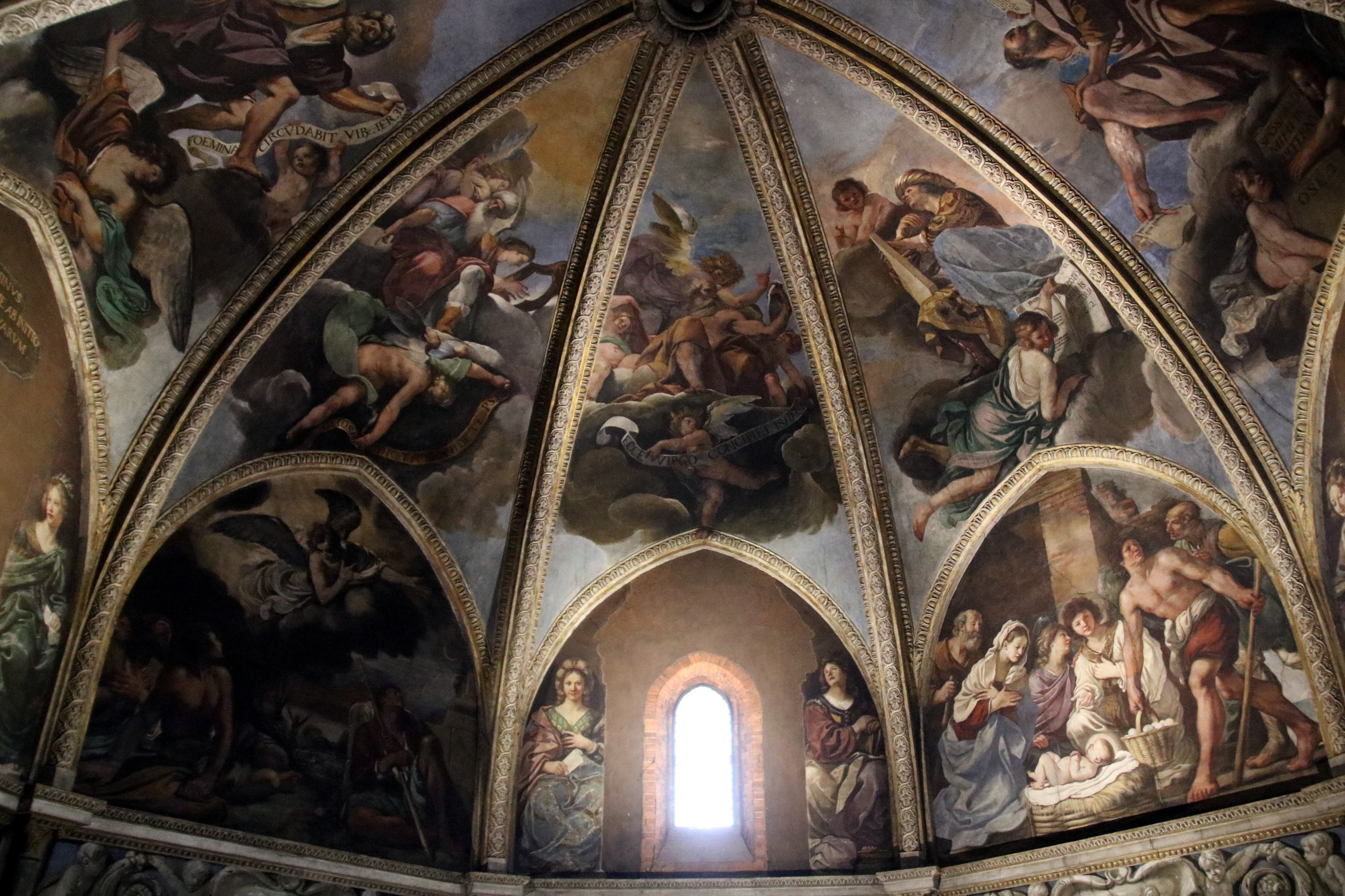 duomo di Piacenza This is a photo of a monument which is part of cultural heritage of Italy.